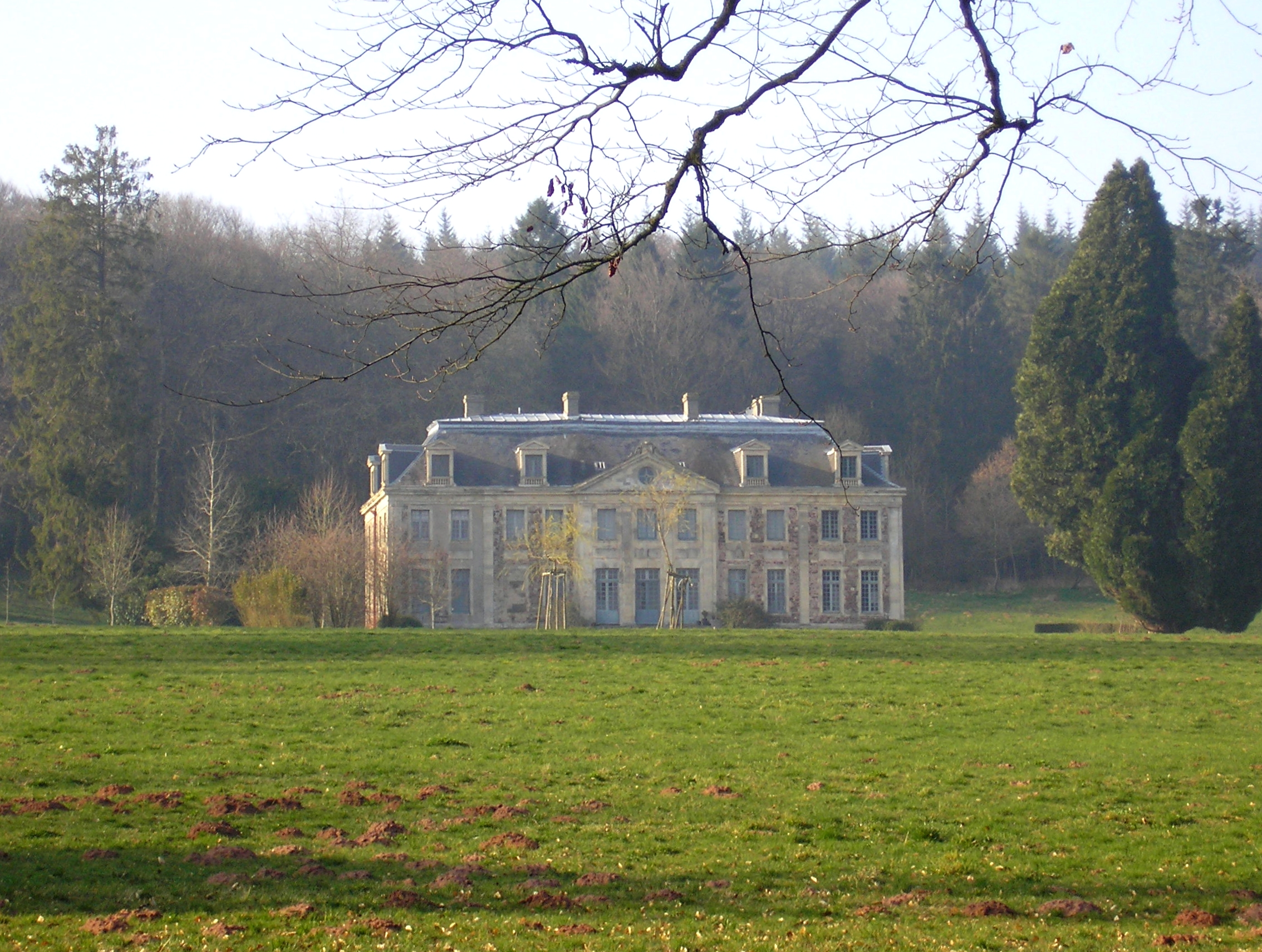 Danvou-la-Ferrière (Normandie, France). Le château de La Ferrière-Duval.